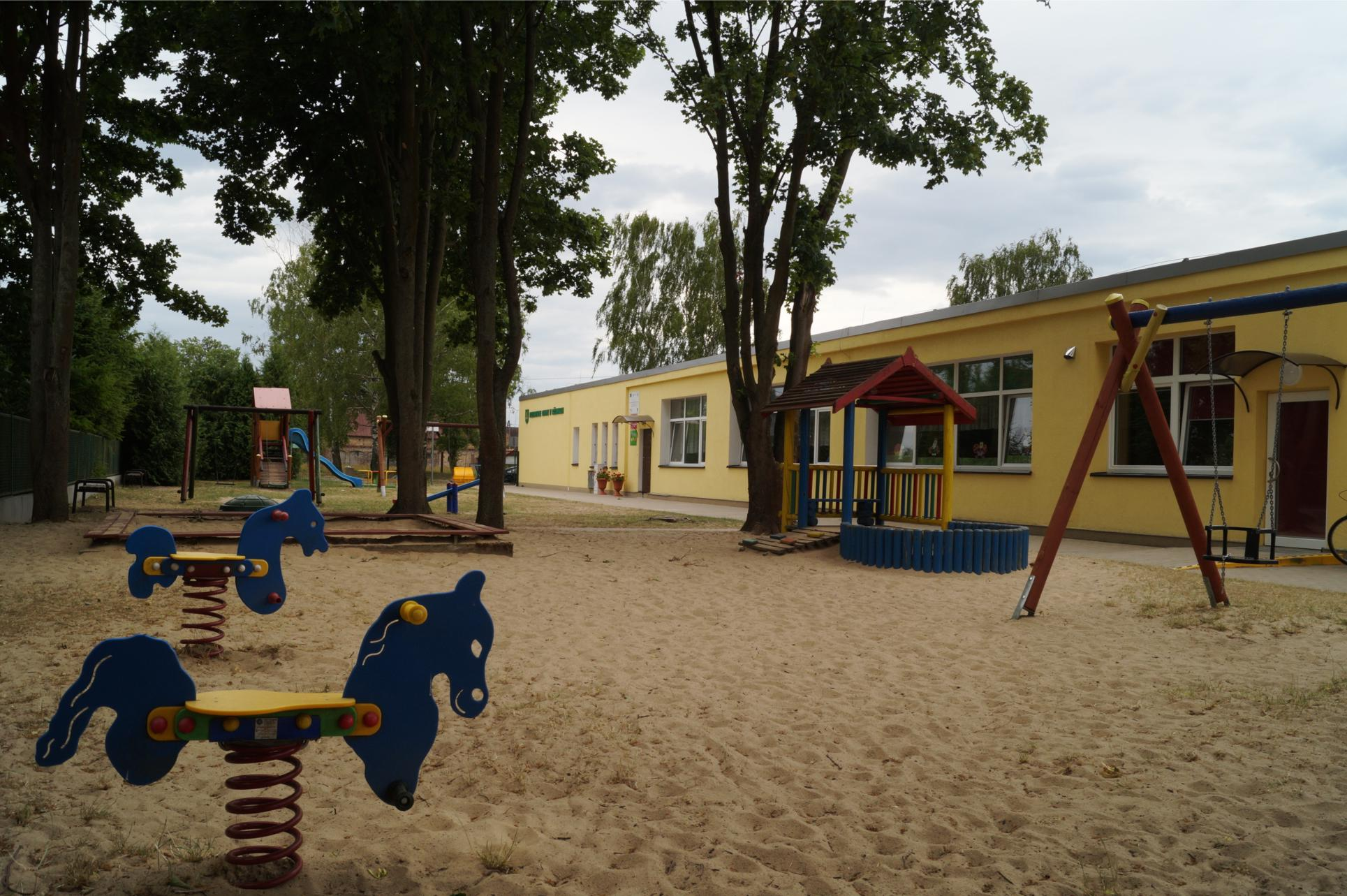 Przedszkole w Różankach